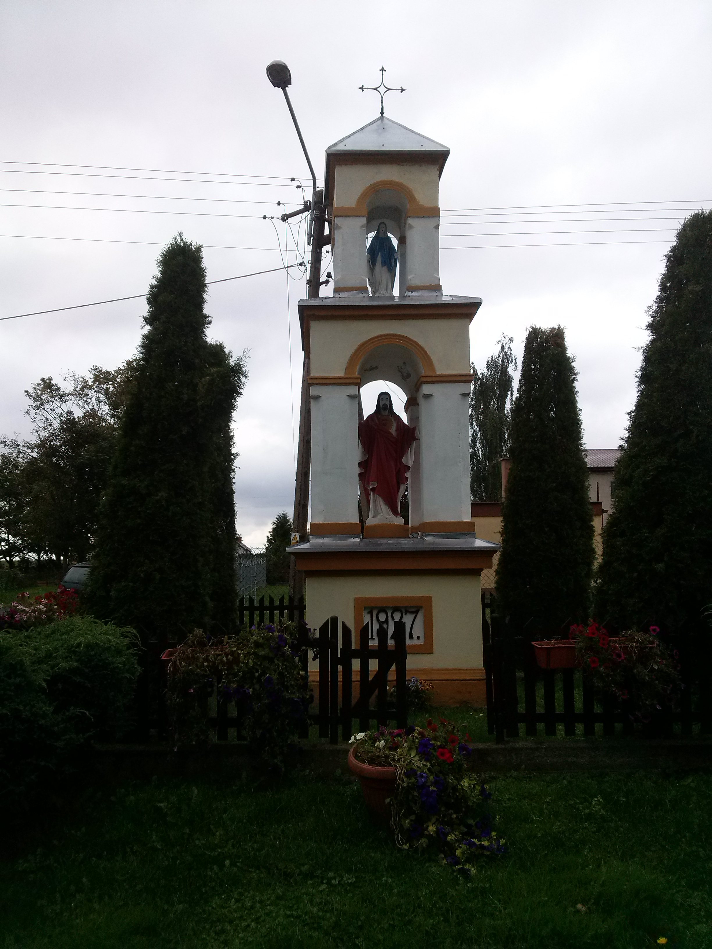 Die Betsäule in Gockowice (Götzendorf), 2017